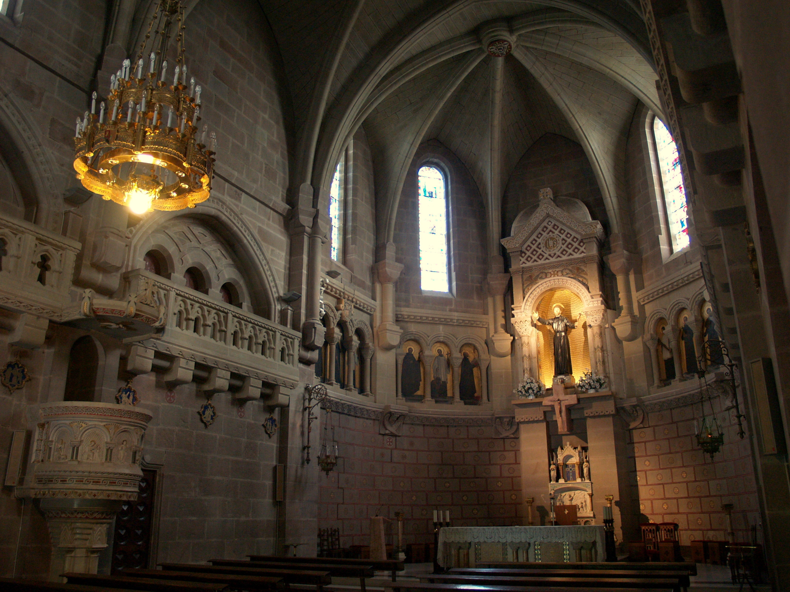 Castell de Javier - Santuari